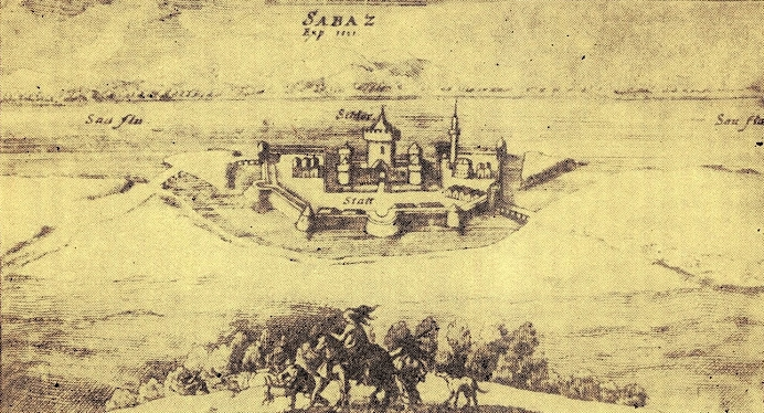 Српски (ћирилица): Шабачка тврђава, угарски приказ, 1527. година